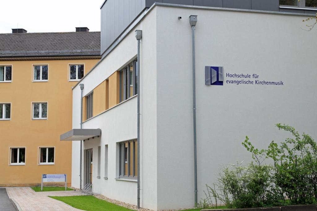 Gebäude der Hochschule für evangelische Kirchenmusik Bayreuth, von der Wilhelminenstraße aus gesehen.